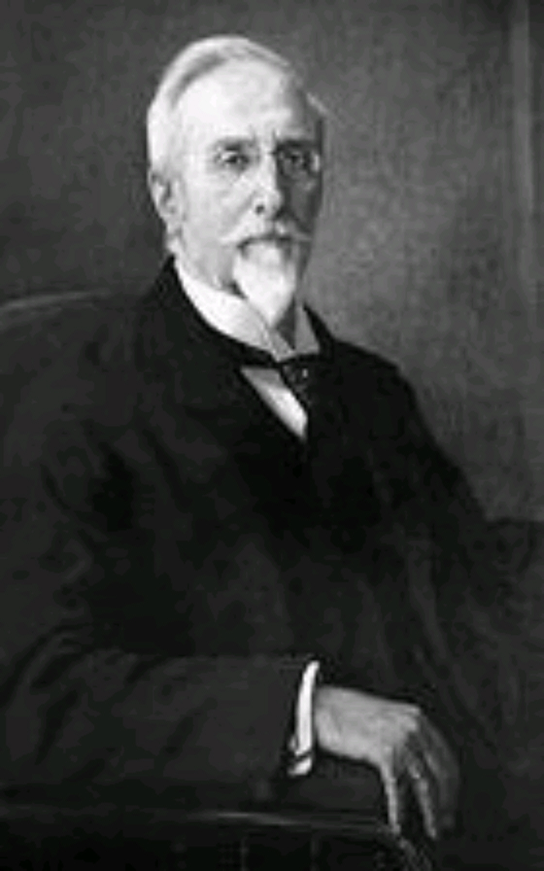 Friedrich von Heyden (* 4. Januar 1838 in Breslau; † 1. Mai 1926 in Radebeul) )